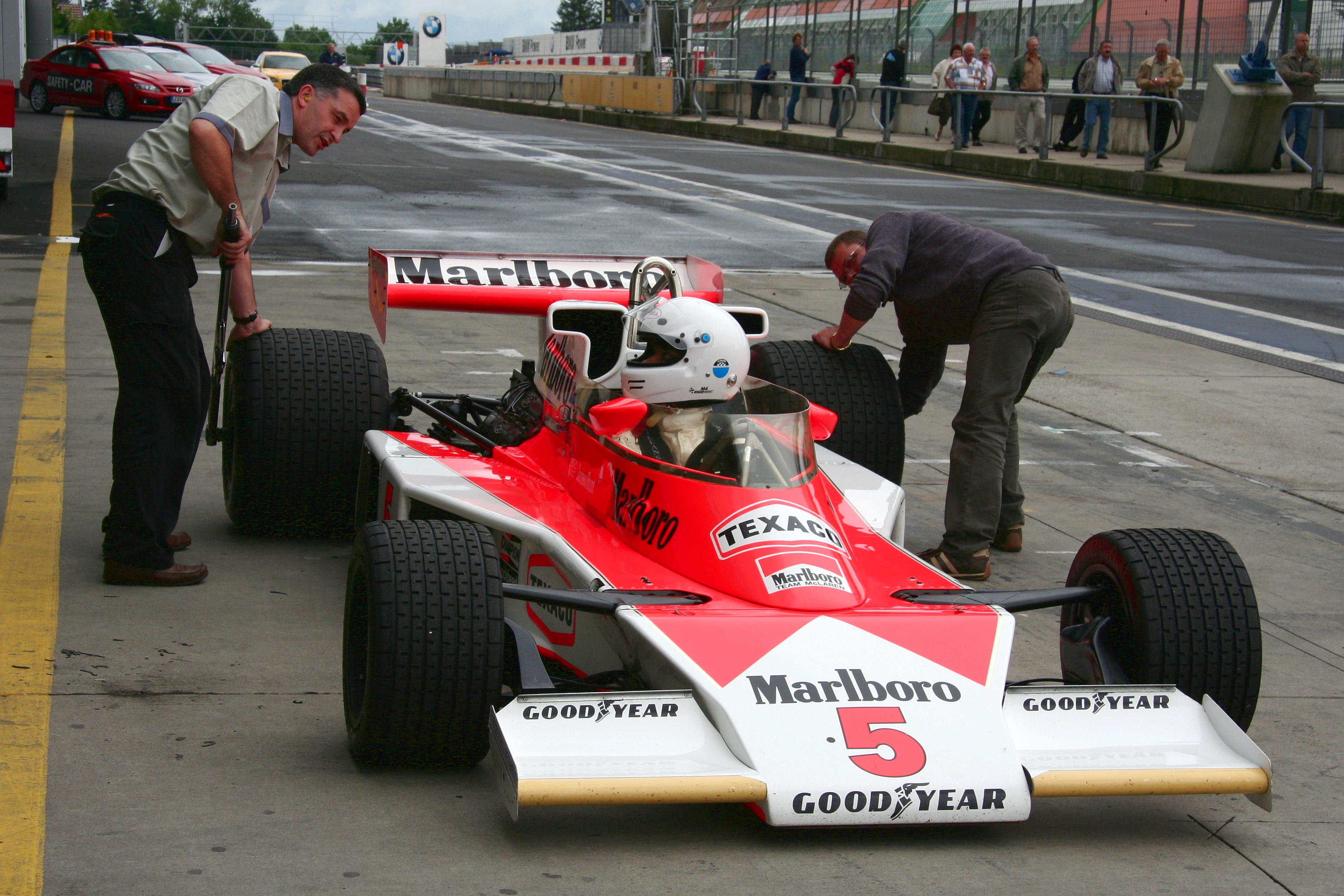 Mc Laren M23, ehemals von James Hunt gefahren, beim Oldtimer Festival des DAMC; Fahrer: Andrea Burani, Italien; schnellste Runde auf dem Grand-Prix-Kurs des Nürburgrings: 2:10,469 min = 142,05 km/h